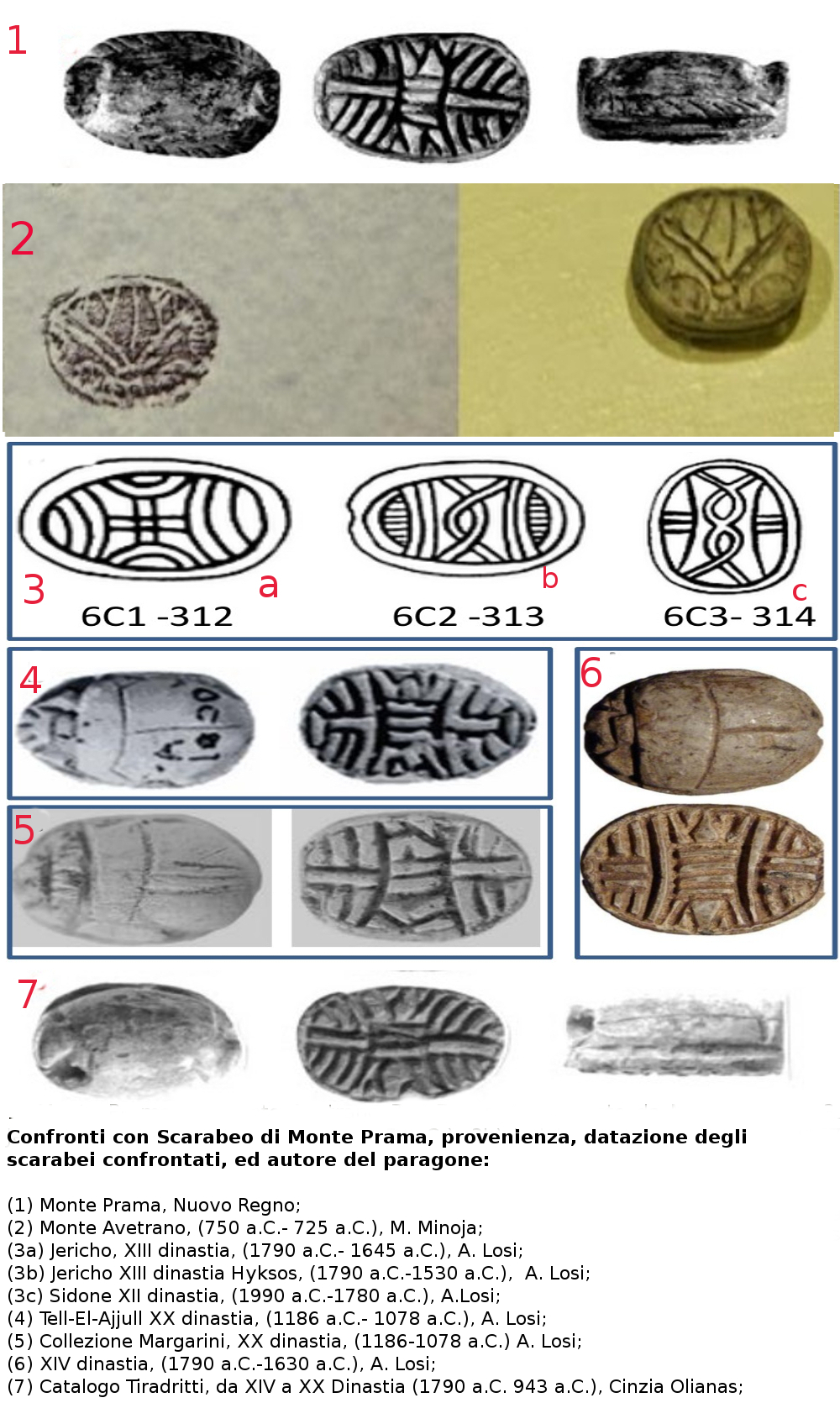 comparazione scarabeo di monte prama